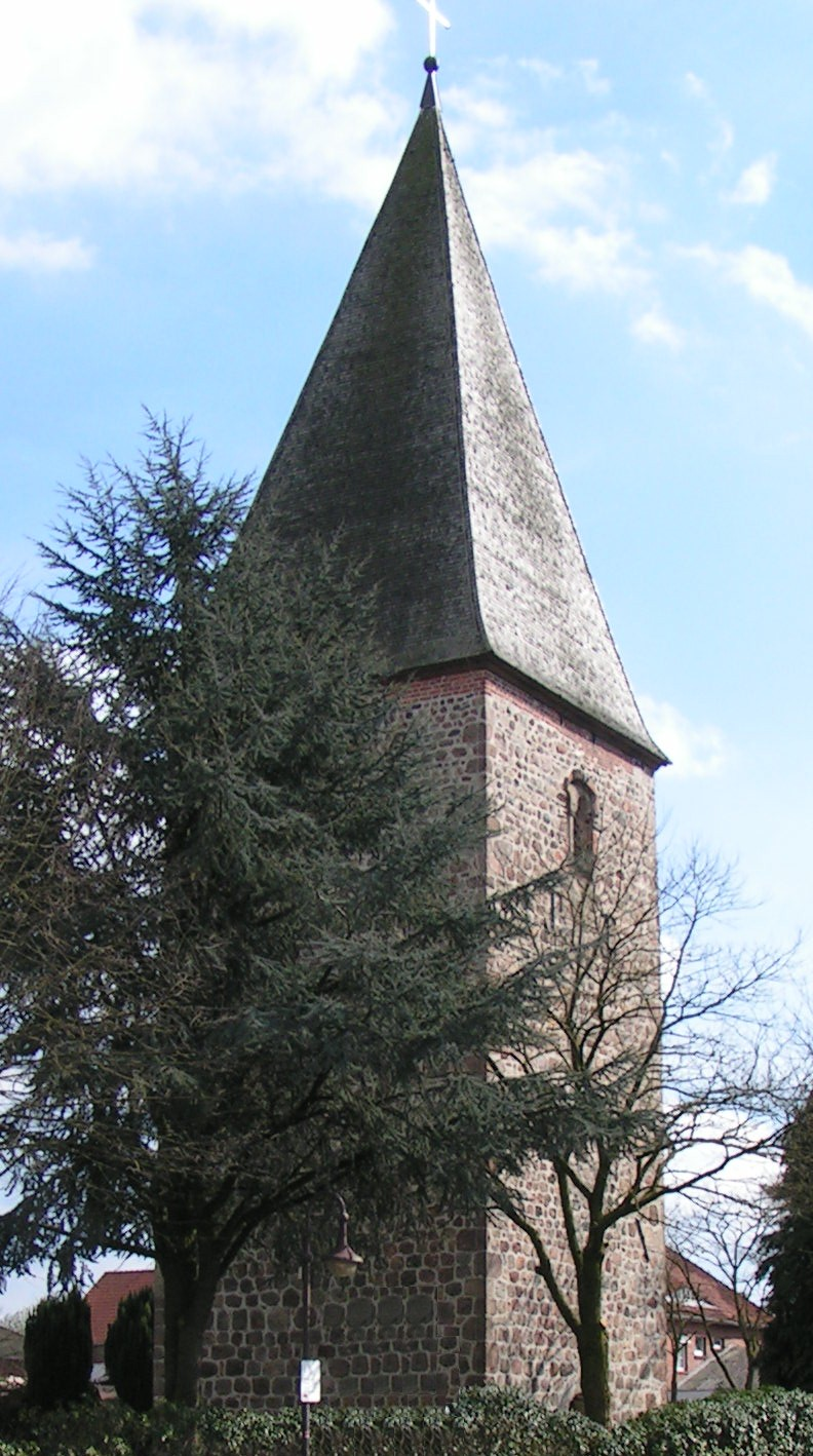 Laurentiusbrunnen und Glockenturm der Pfarrkirche St. Laurentius in Langförden